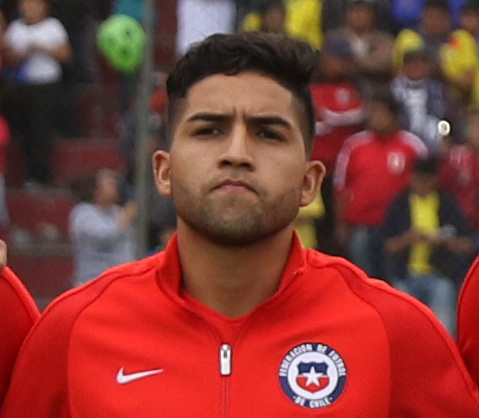 Ambato, Ecuador, 22 enero 2017 (Andes).- Ecuador igualó 1-1 este domingo con Chile en la ciudad de Ambato y dejó vivas las posibilidades de clasificar a la fase final del Campeonato Sudamericano Sub 20 del que es anfitrión, y se alista desde ya para jugar con Paraguay en la última jornada, el jueves próximo, en la ciudad ecuatoriana de Ríobamba. ANDES/Micaela Ayala V.